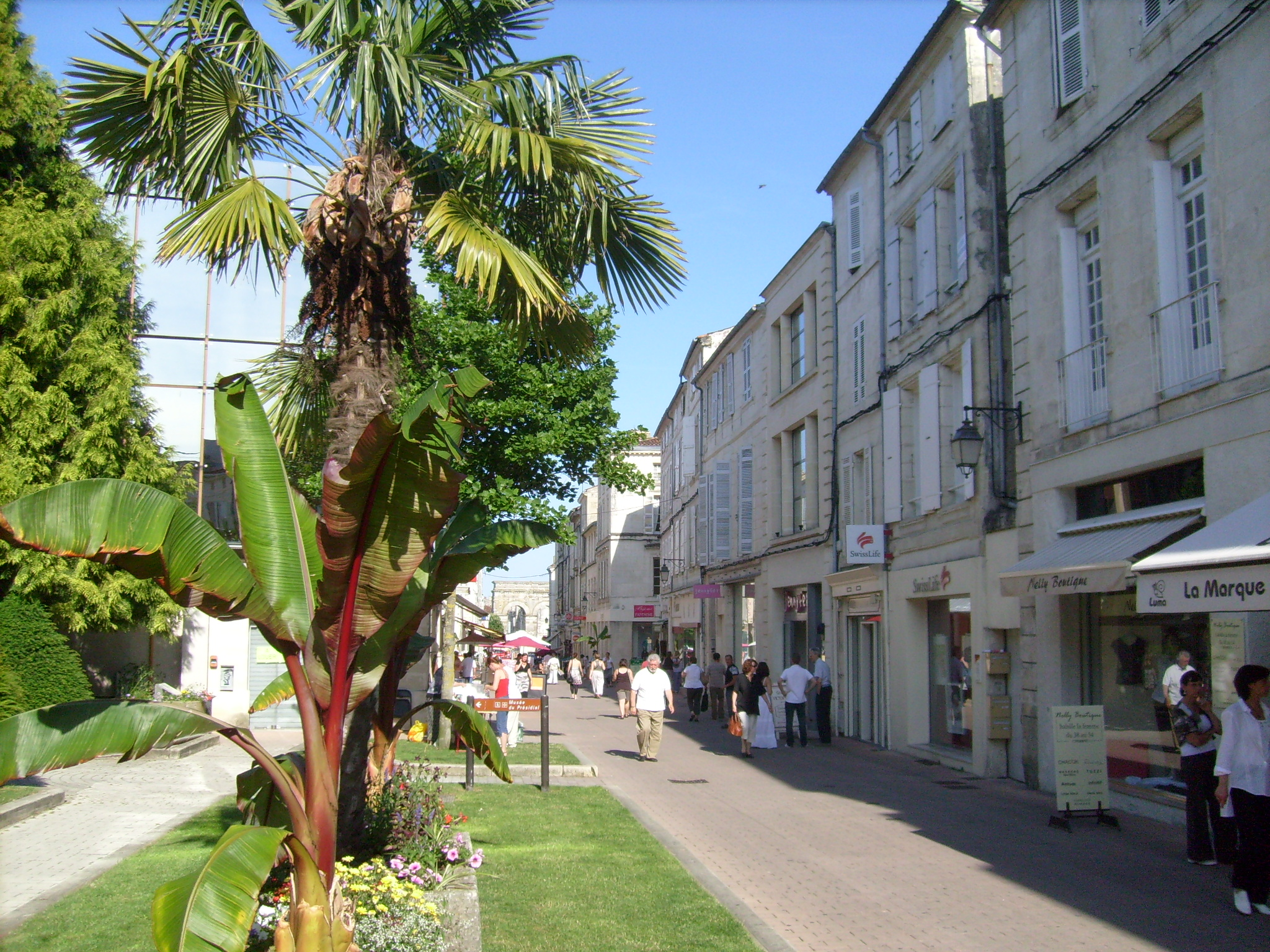 La rue Victor Hugo à Saintes